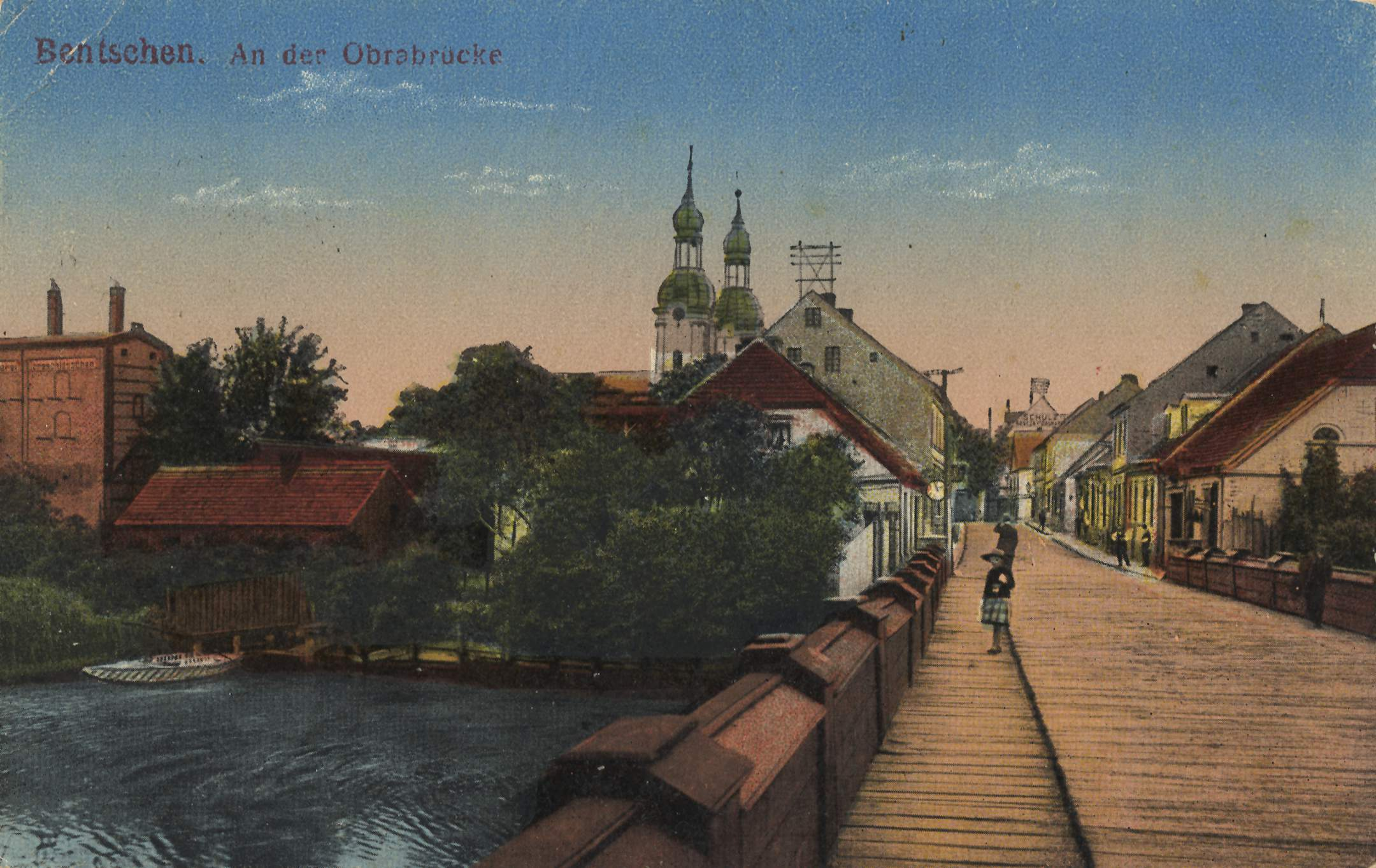 Obrabrücke